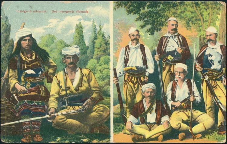 Албански бунтовници